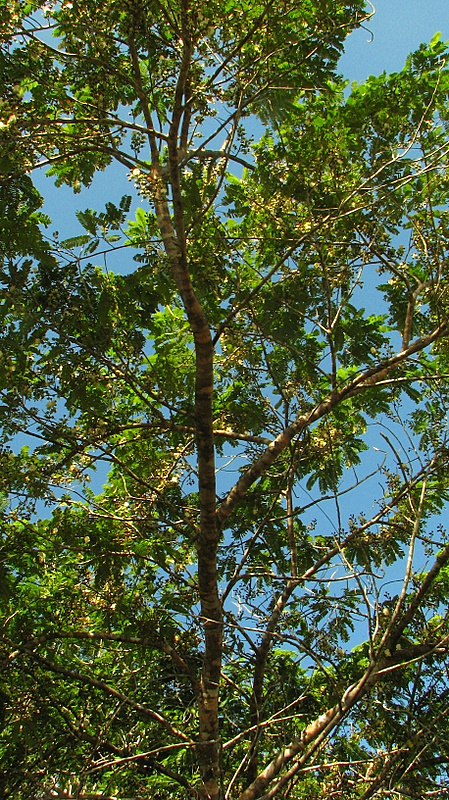 Swartzia polita, Bahia, Brazil